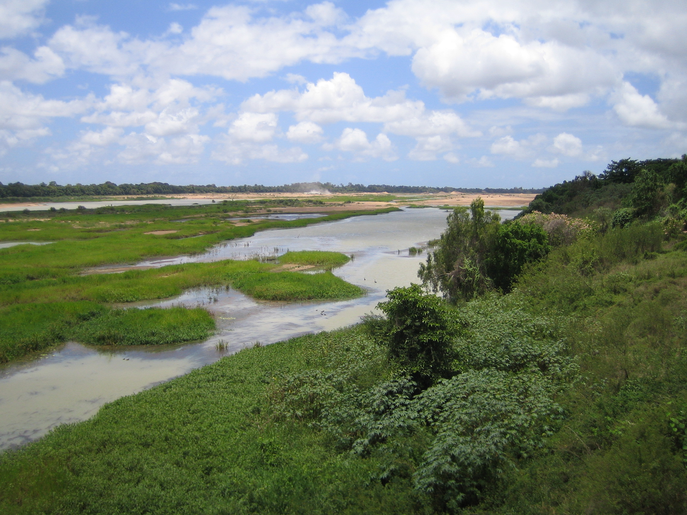 Burdekin River, Queensland, Australie